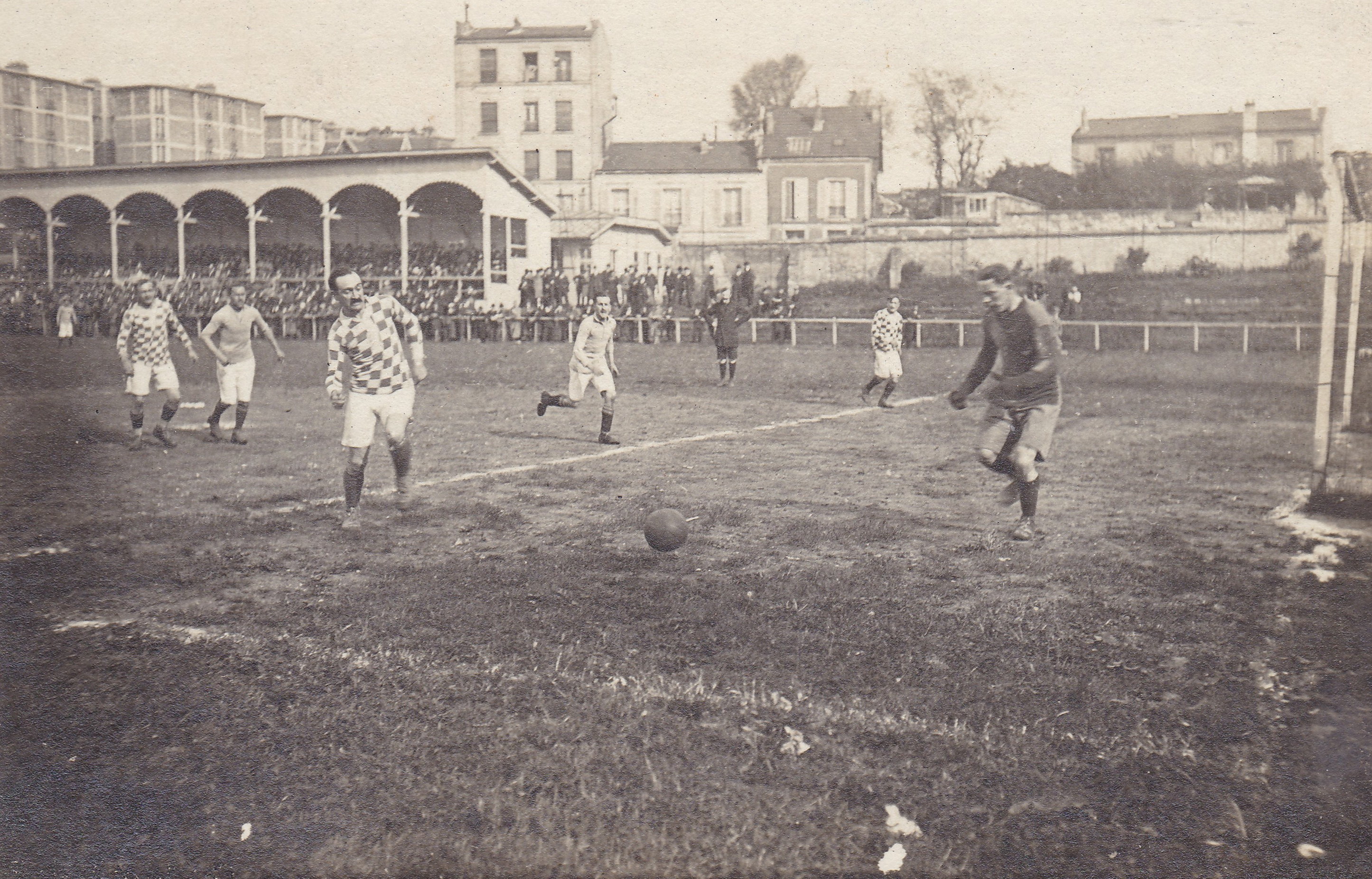 Carte postale retrouvée en 2020, présentant une scène de la Finale de la Coupe de France 1918 entre l'Olympique Pantin et le FC Lyon On y voit le gardien René Decoux (Olympique) se diriger vers le ballon sous le regard d'André Weber (FC Lyon) et d'autres joueurs, ainsi que la tribune du stade de la Légion Saint-Michel bien garnie en arrière-plan.